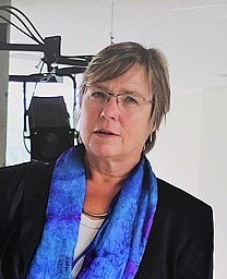 Ulrike Elsdörfer, deutsche Theologin und Ethnologin (2013), Bildausschnitt